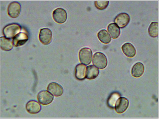 Pluteus cervinus spores